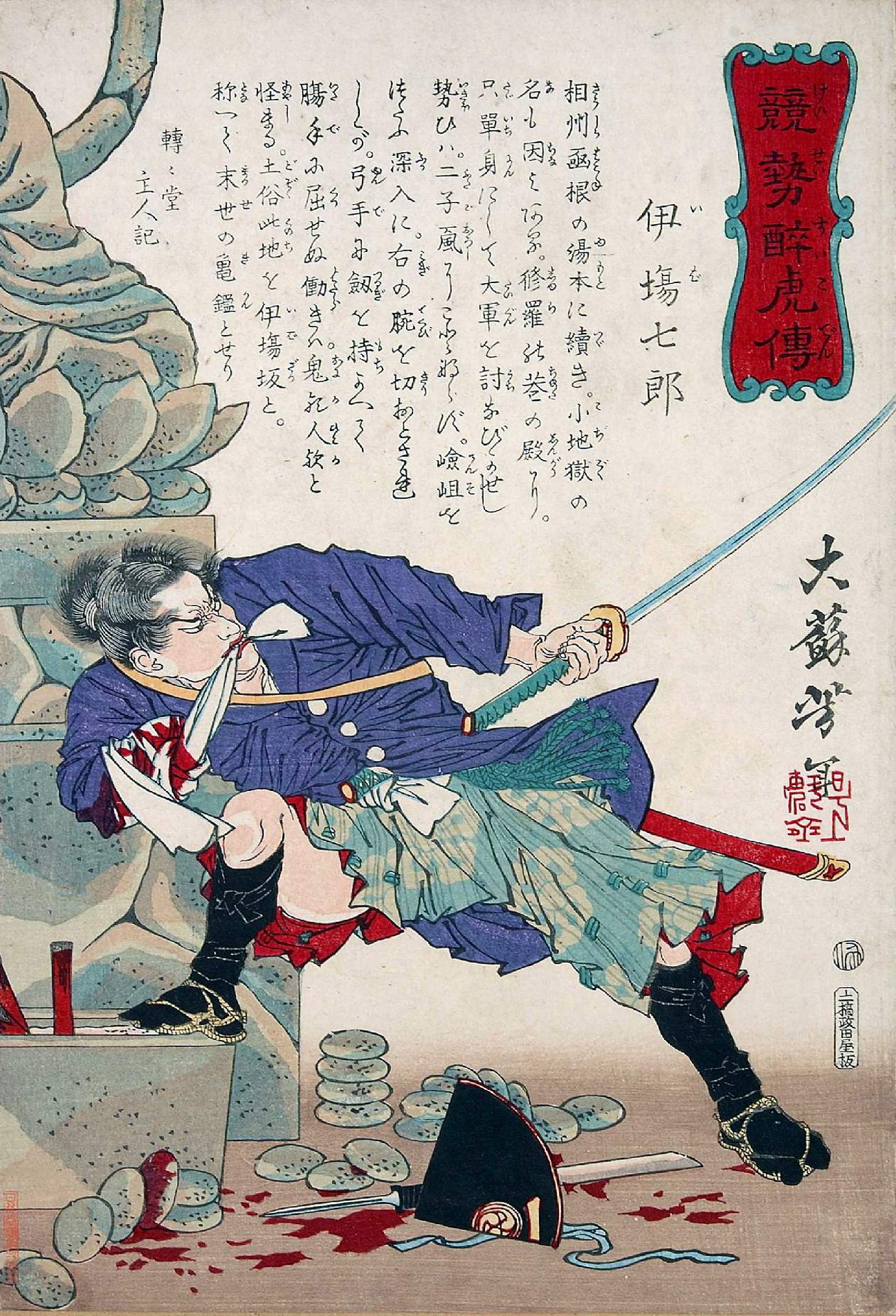 「競勢酔虎伝：伊場七郎（＝伊庭八郎）」 1874年